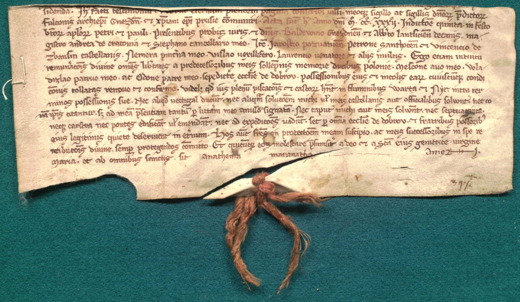 Władysław Odonic, ks. wielkopolski, zatwierdza klasztorowi cystersów w Sulejowie zwrot kościoła i klucza Dobrowa i odnawia immunitet. Język: łac. Opis zewnętrzny: oryg., 1 k. pergaminowa, 24 x 9 cm; sznur po pieczęci; uszkodzony, ucięta część pierwsza